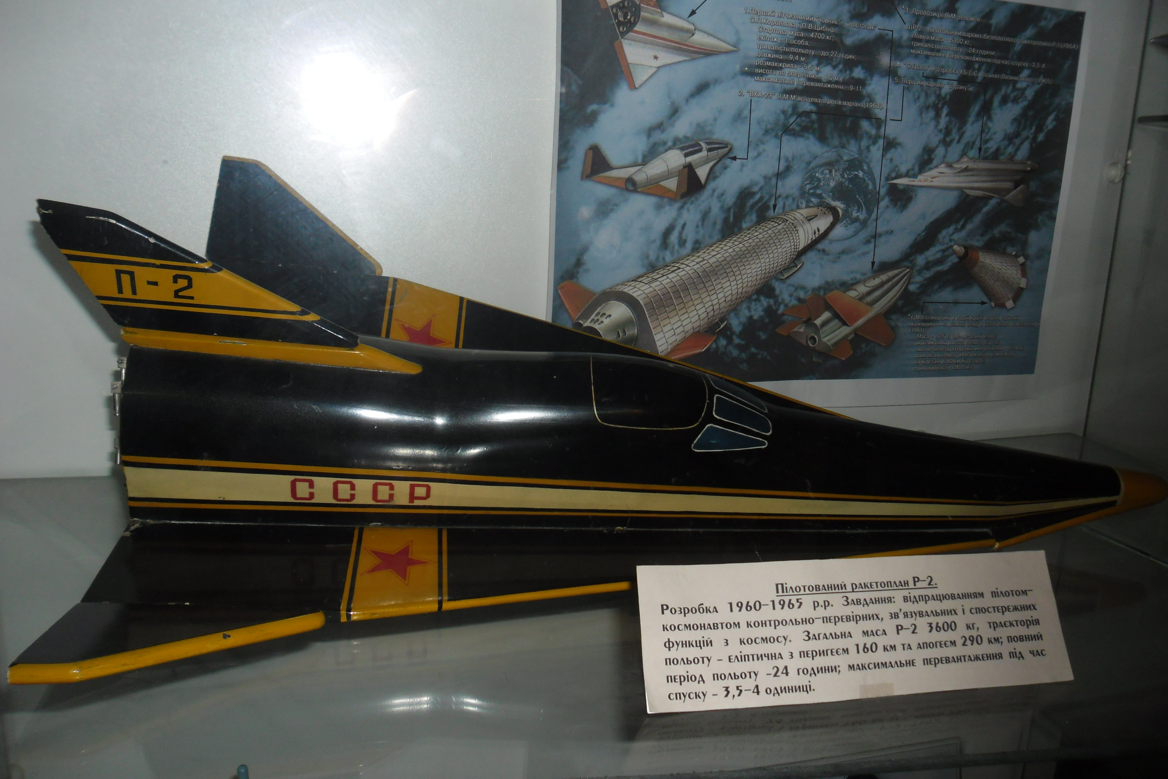 Ракетоплан Р-2